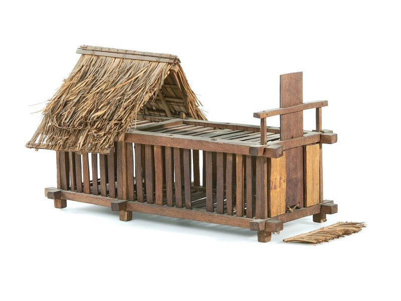 Model. Houten model van een val voor het vangen van tijgers